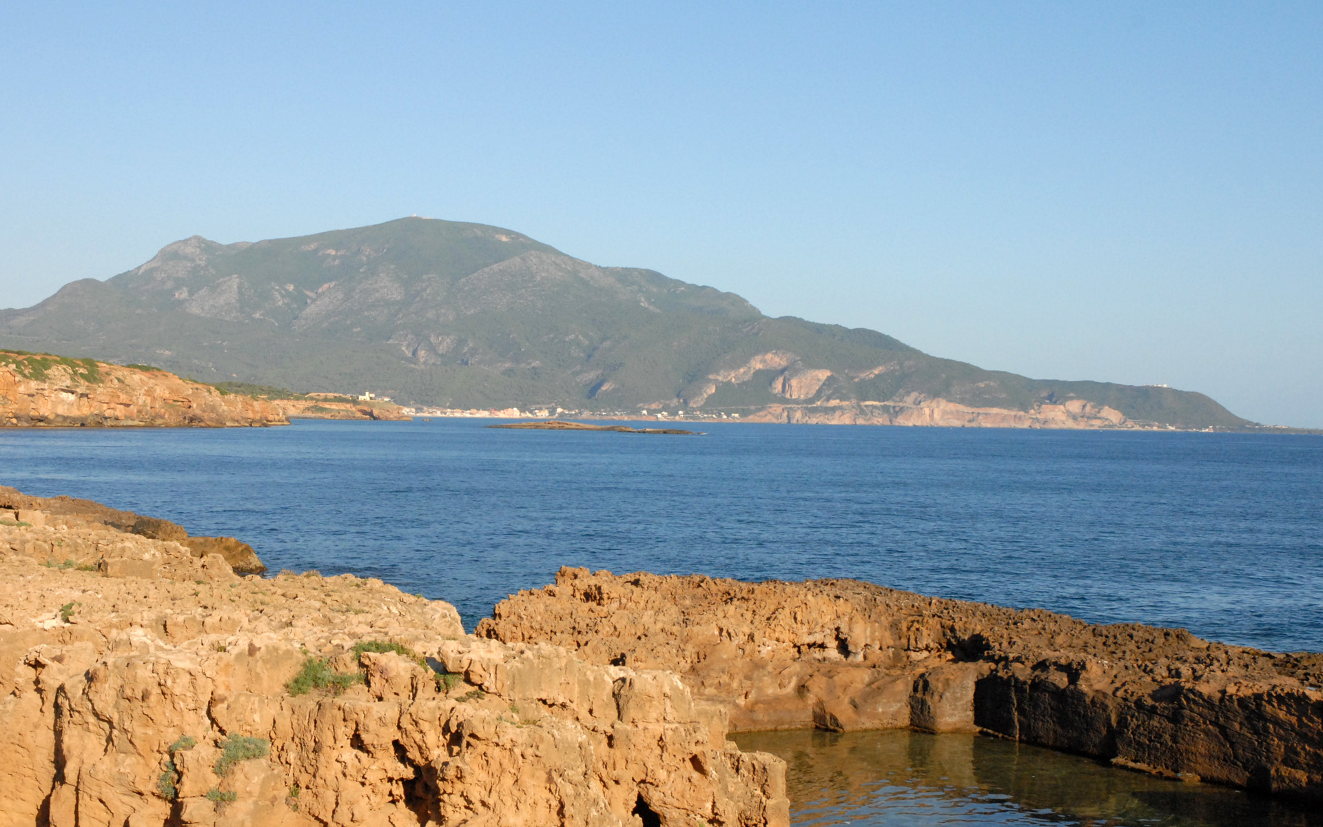 Vue sur la baie de Tipaza et le mont Chenoua (Tipaza) en arrière plan (Algérie).